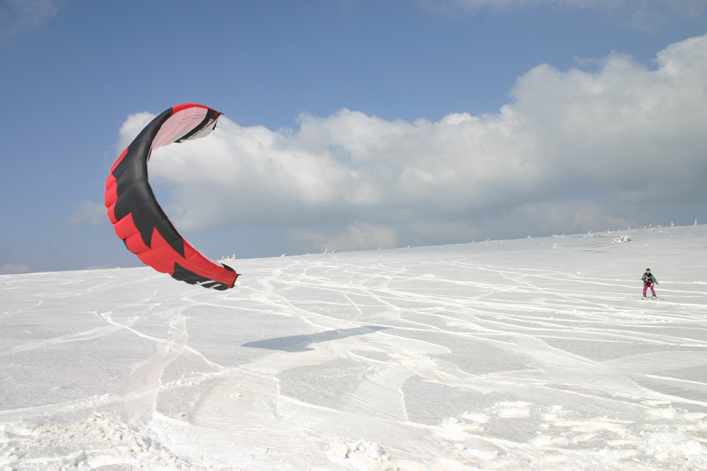 zdjecie polskiego snowkitera